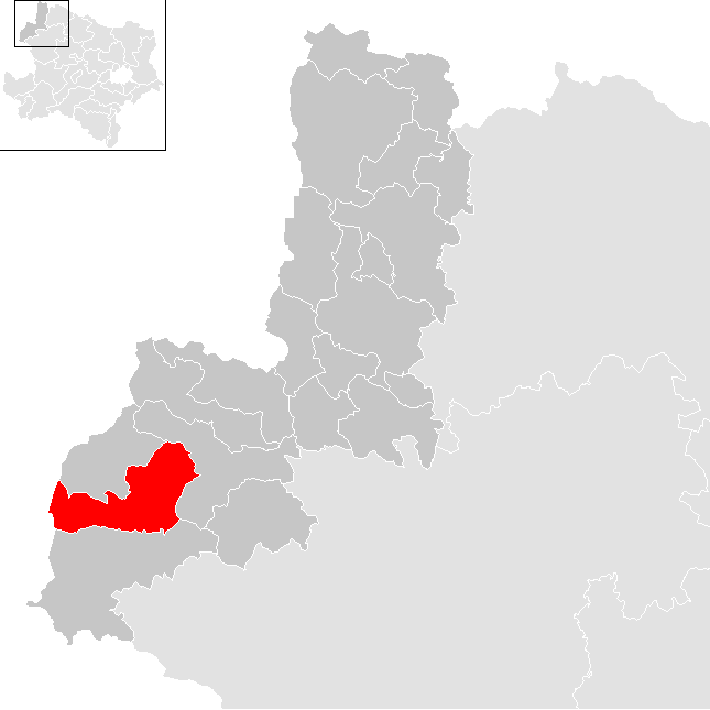 Bezirk Gmünd